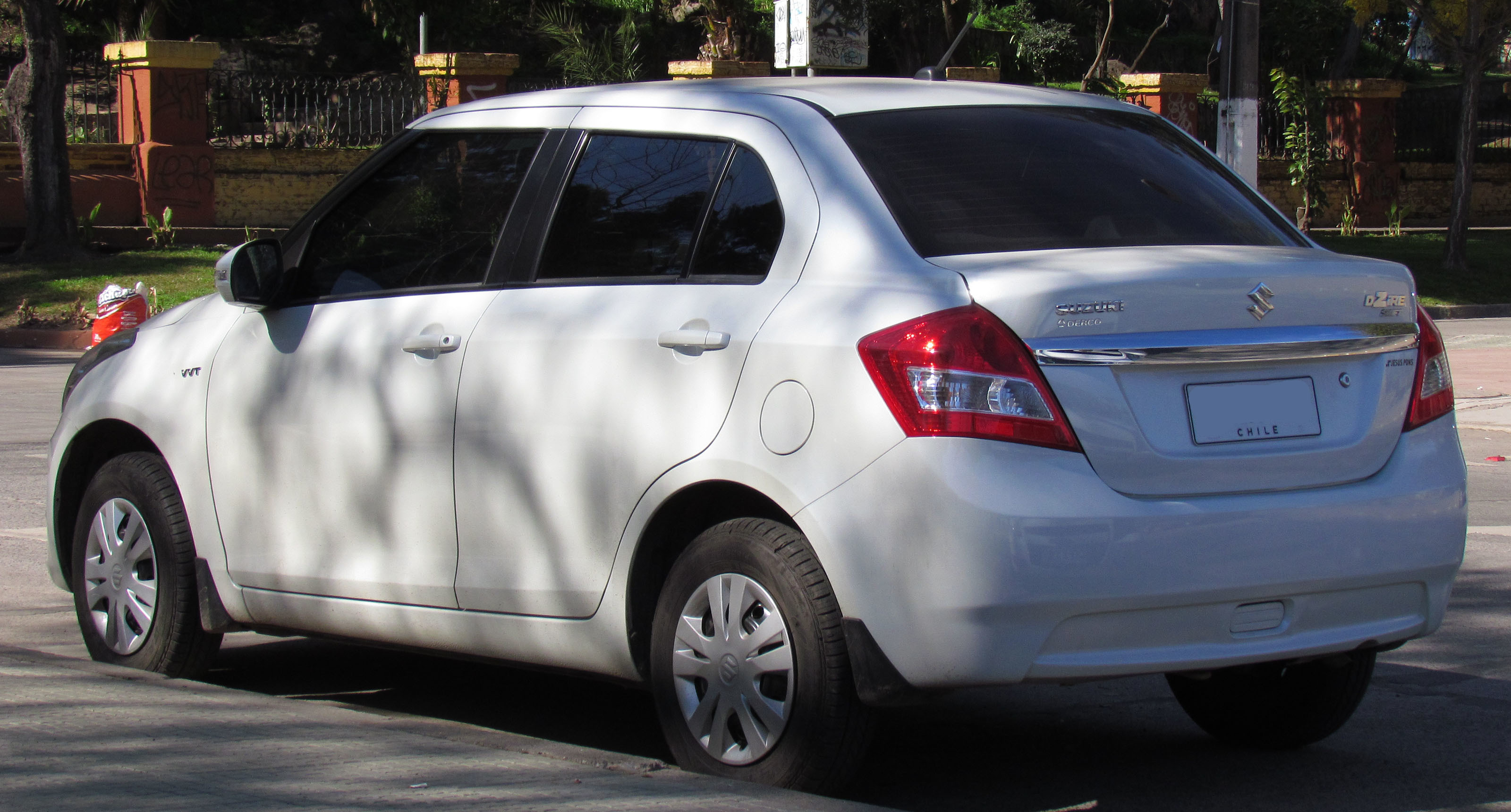 Suzuki Swift DZire 1.2 GL 2013